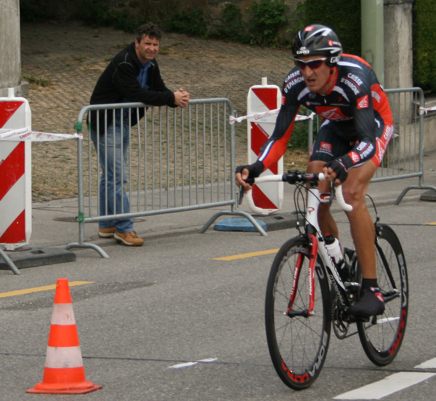 Fransicso Perez Sanchez prologue du Tour de Romandie 2007